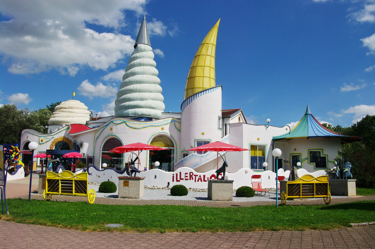 BAB Raststätte Illertal Ost